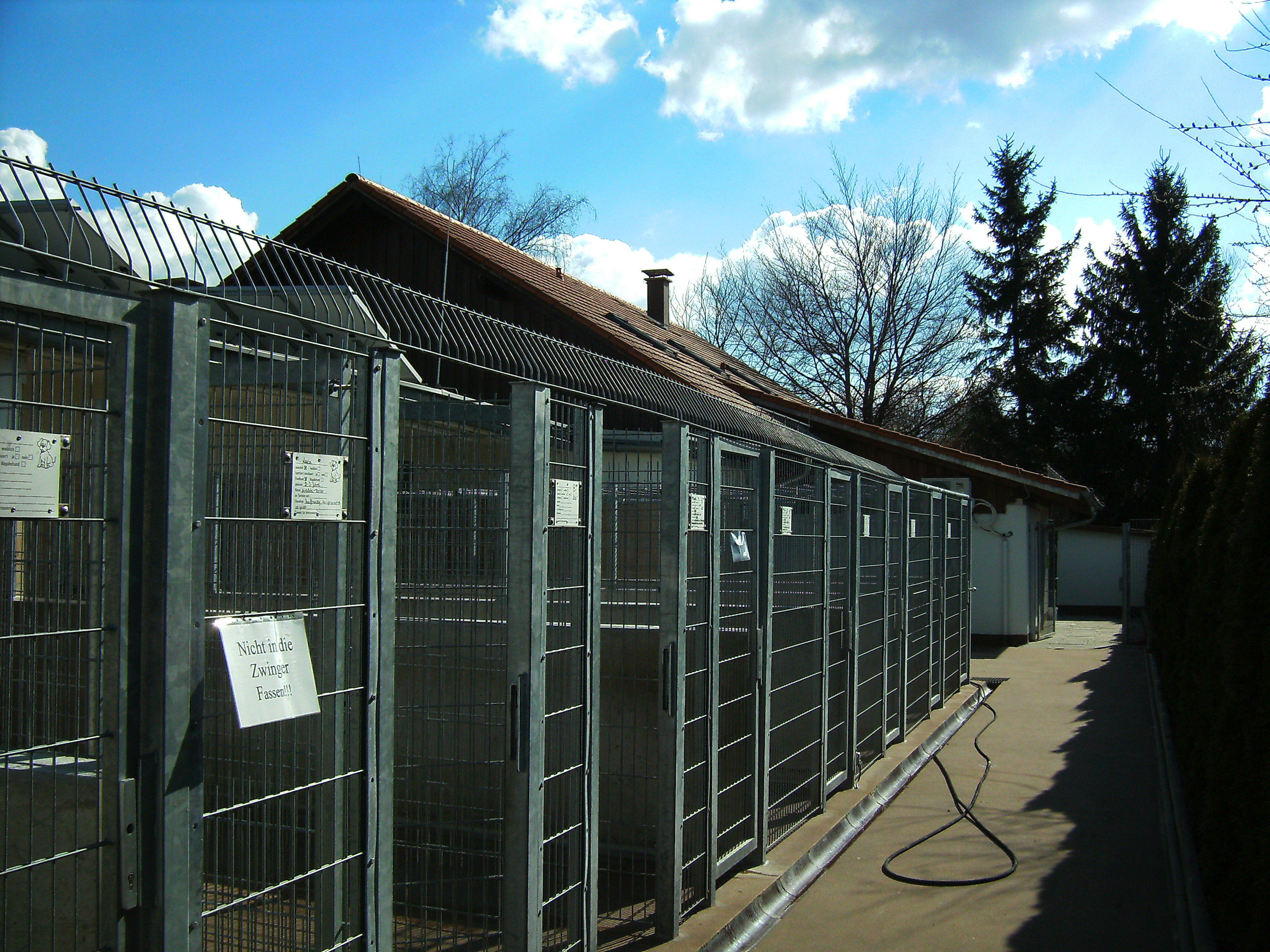 Tierheim Memmingen beim Vogelsbrunnen